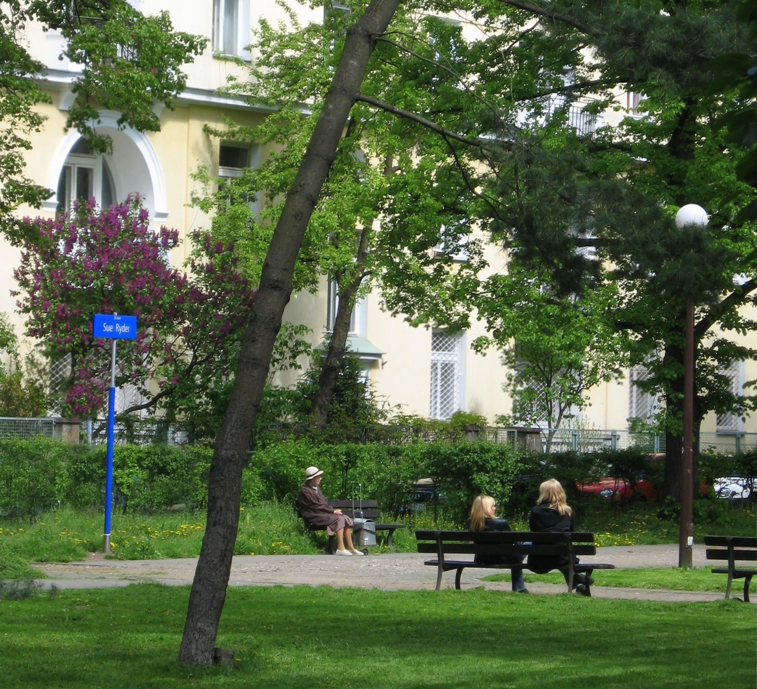 Wraszawa, Stara Ochota, Skwer im. Sue Ryder